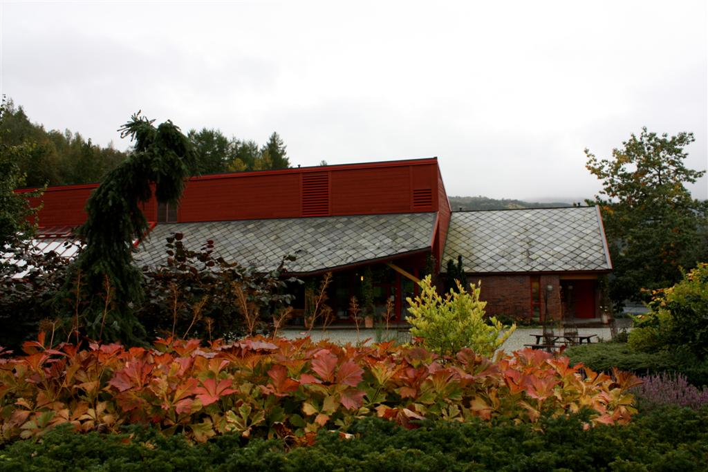 Hjeltnes gartnerskole